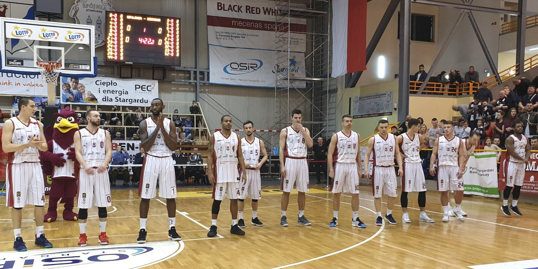 Spójnia - Krosno